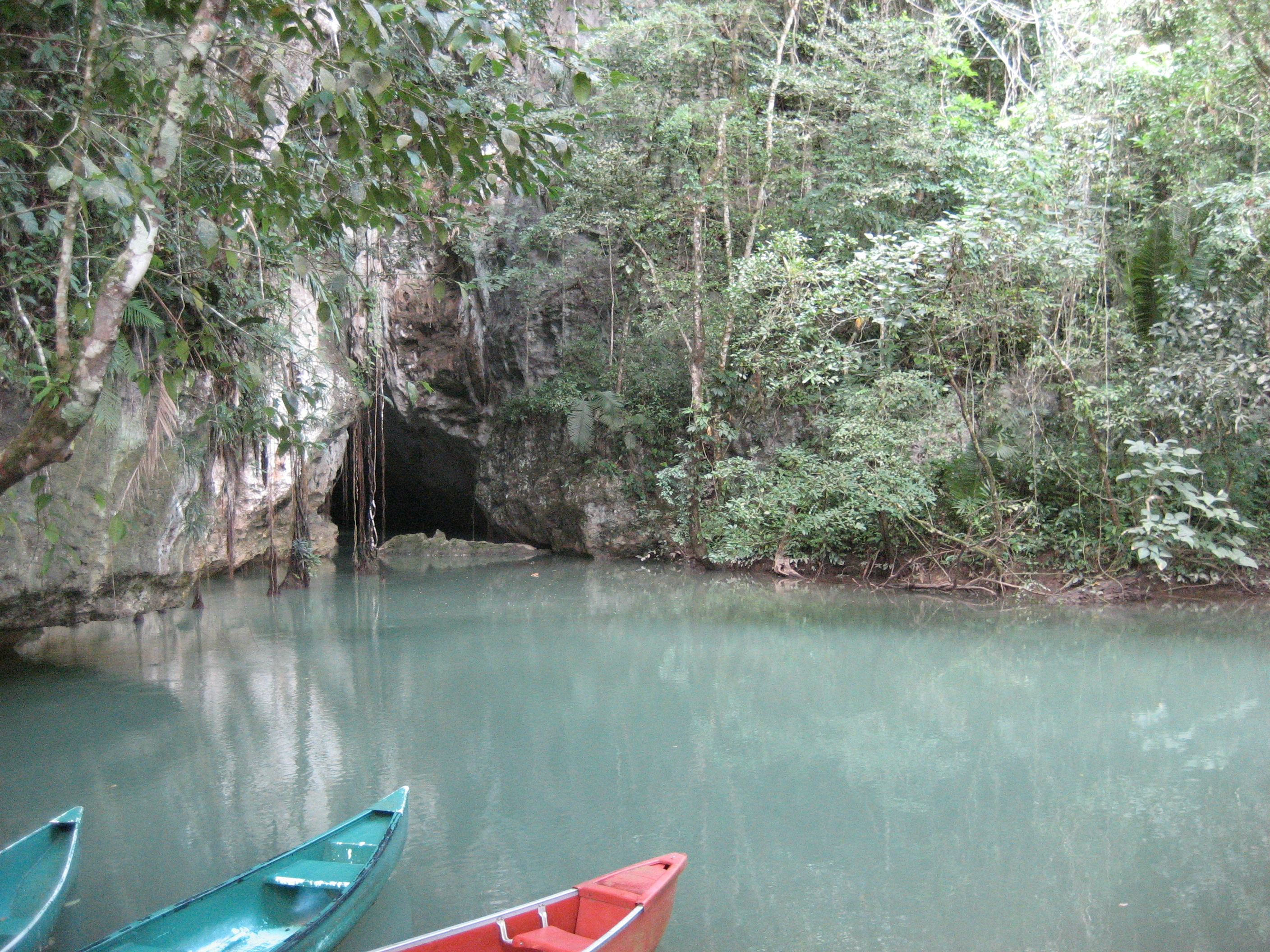 Mayan Cave